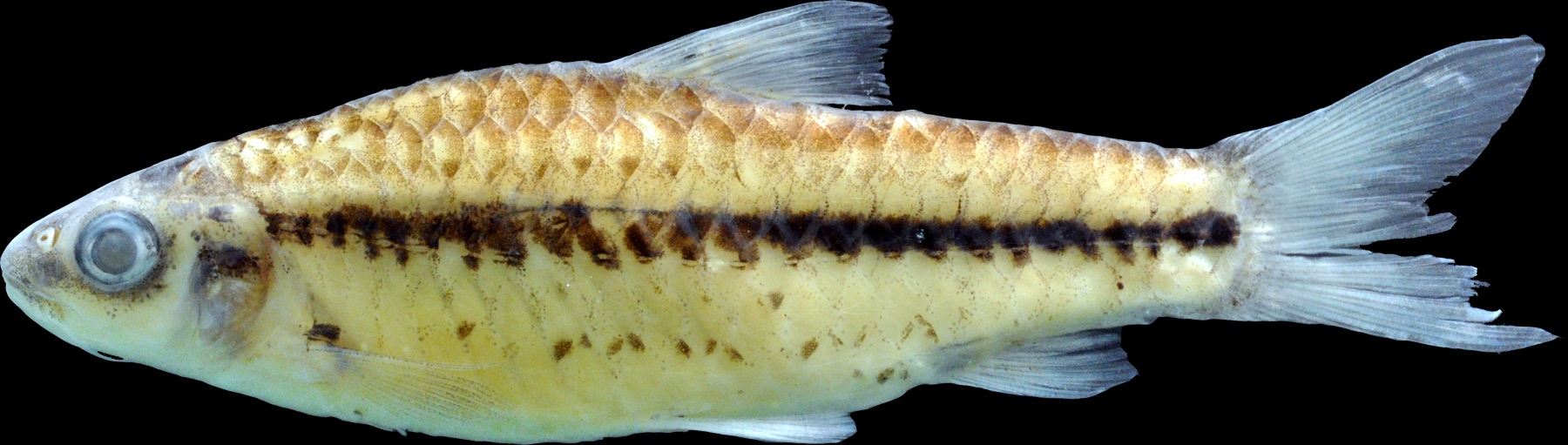 Barbus_niokoloensis_AUM59565_41.1L